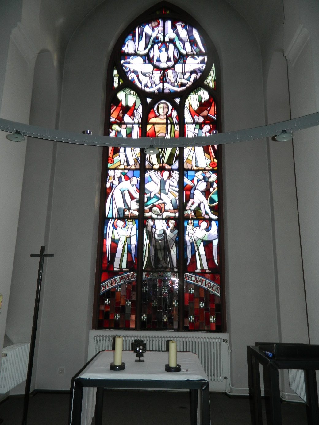 Die römisch-katholische Hauskapelle im Hotel St. Michael befindet sich in der zweiten Etage des gleichnamigen Hotels in Tauberbischofsheim im Main-Tauber-Kreis. Die Hauskapelle im Hotel St. Michael wurde im Jahre 1891 gemeinsam mit dem Gebäude des Hotels St. Michael errichtet. Die Hauskapelle bietet Platz für etwa 50 Personen. Die bunt verzierten Fenster der Kapelle stammen aus dem Jahre 1891 (Entstehungsjahr des Hauses), als das Erzbischöfliche Knabenkonvikt, eine Vorgängerschule des Matthias-Grünewald-Gymnasiums, mit Wohnheim, Internat und Kapelle für auswärtige Schüler errichtet wurde.